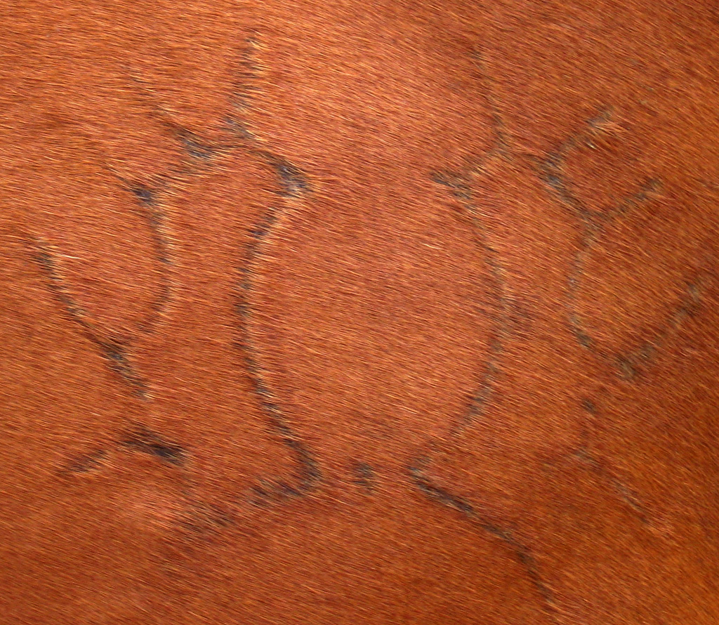 Trakehner Zuchtbrand